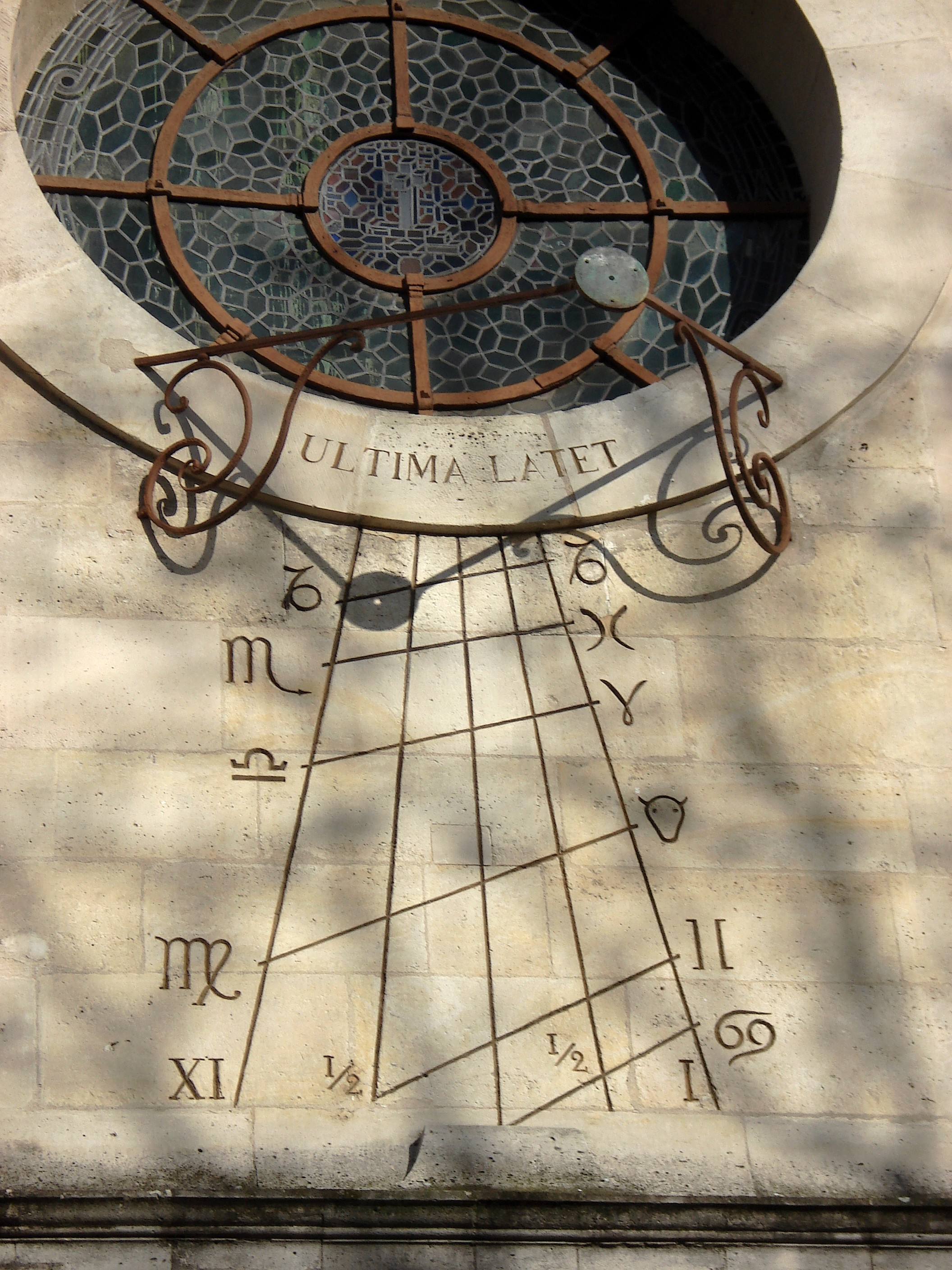 Cadran solaire méridien sur le mur extérieur de la chapelle Saint-Louis de l'hôpital de la Pitié-Salpétrière (Paris XIIIe arrond.). XVIIe siècle (photo prise à 12h15).